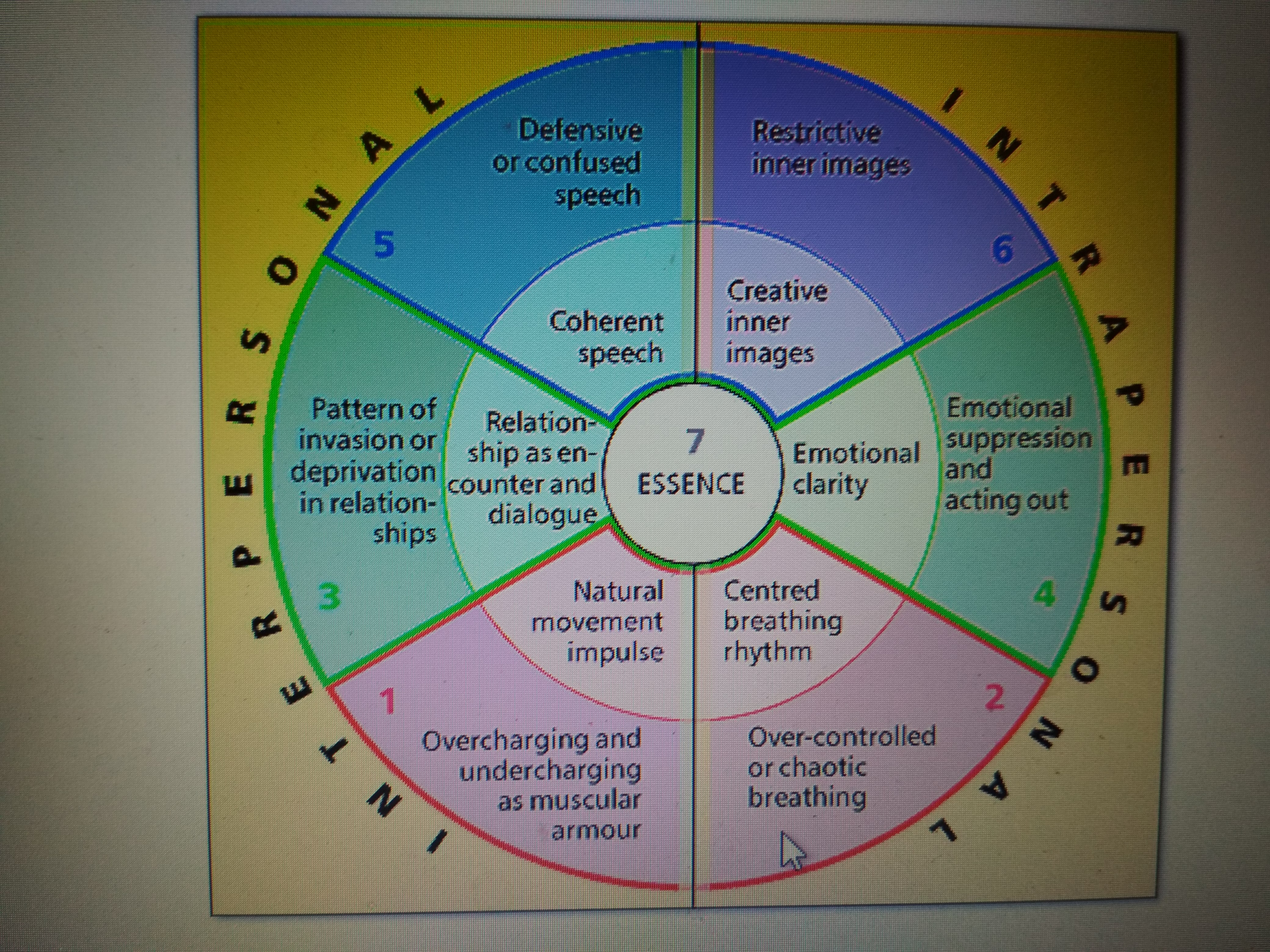 Model životních polí - Life fields